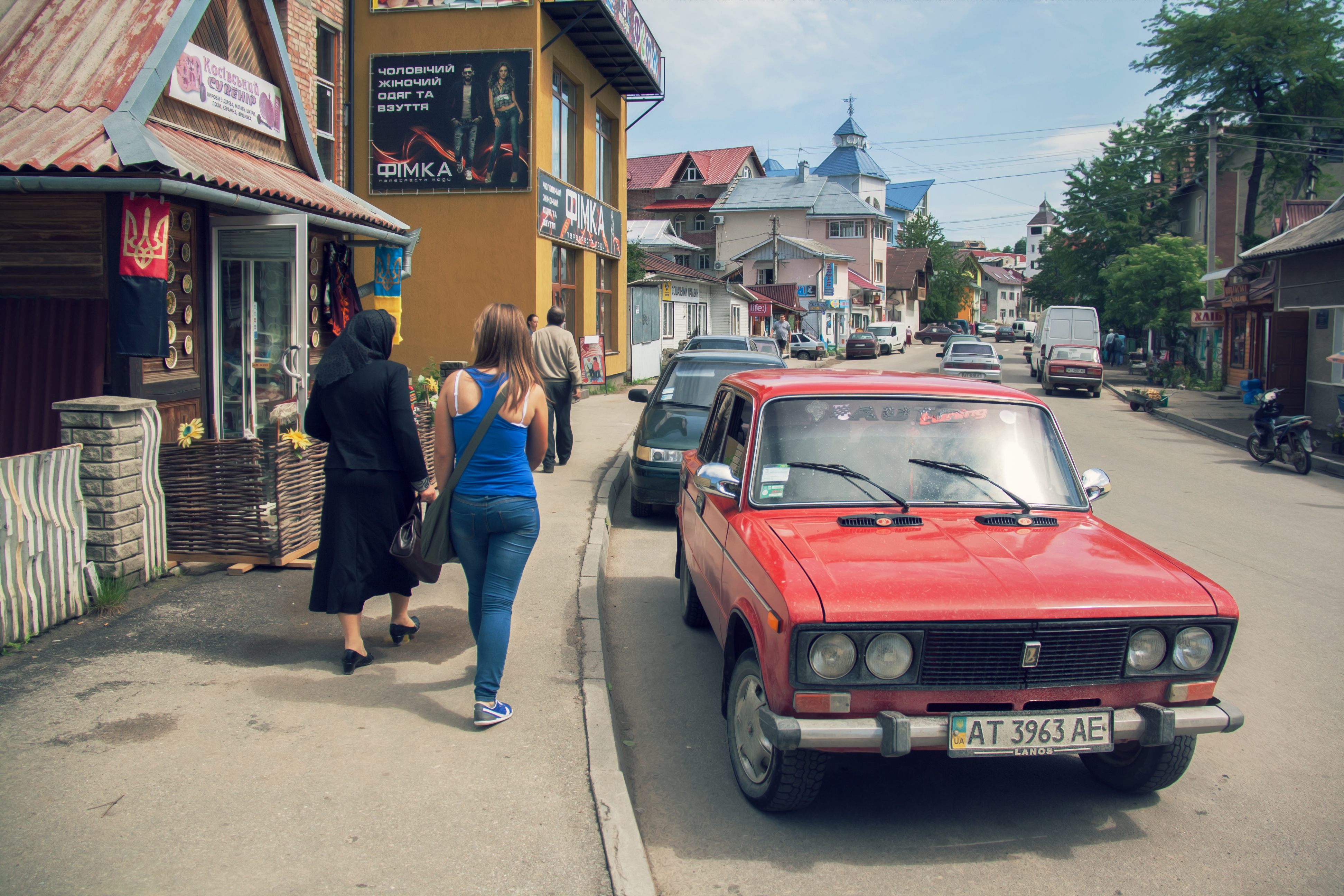 Kosiv, Ucrania